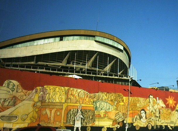 Los Conductores del País Mural, Universidad Central de Venezuela - Caracas, Venezuela